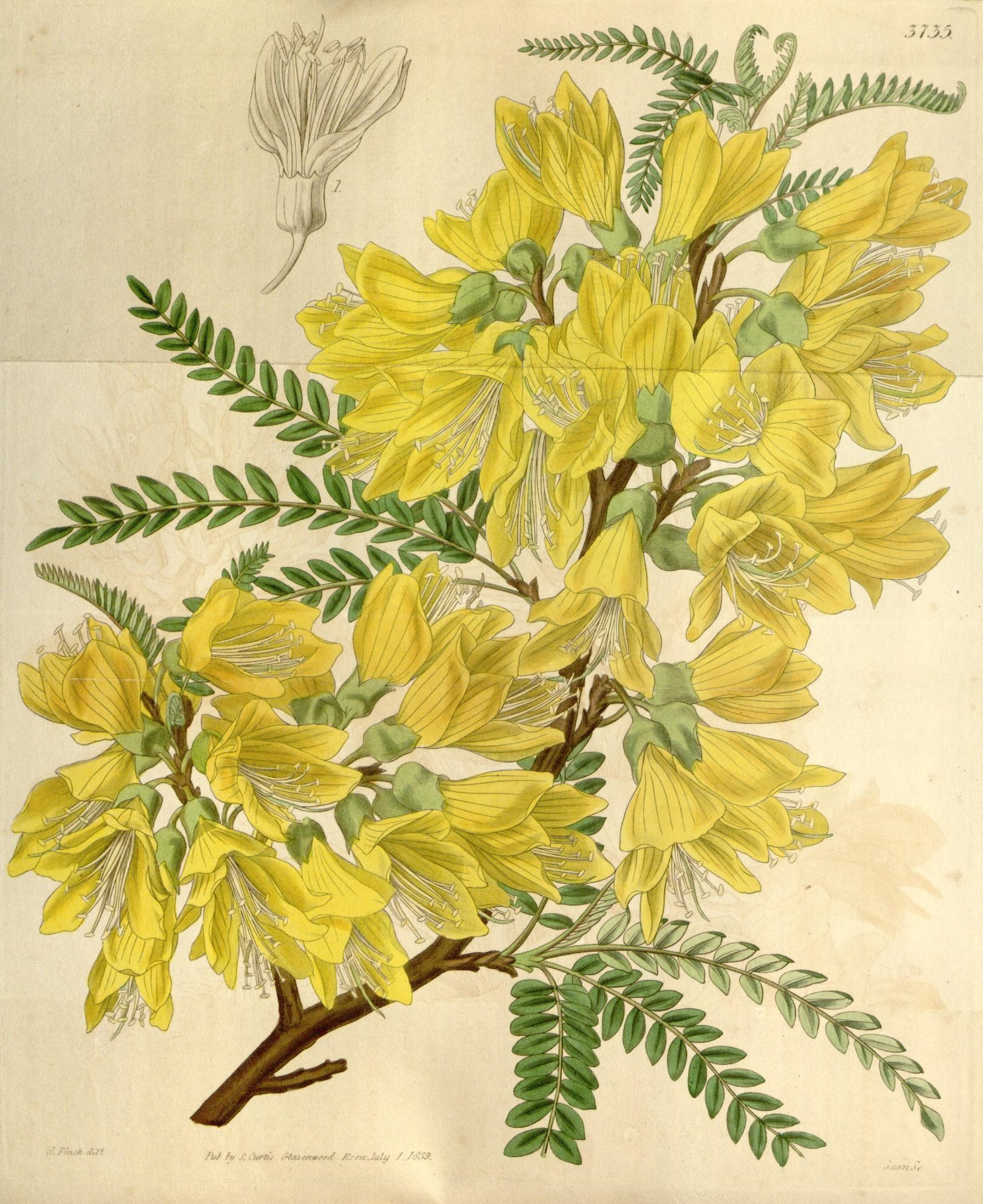 5 1 I \